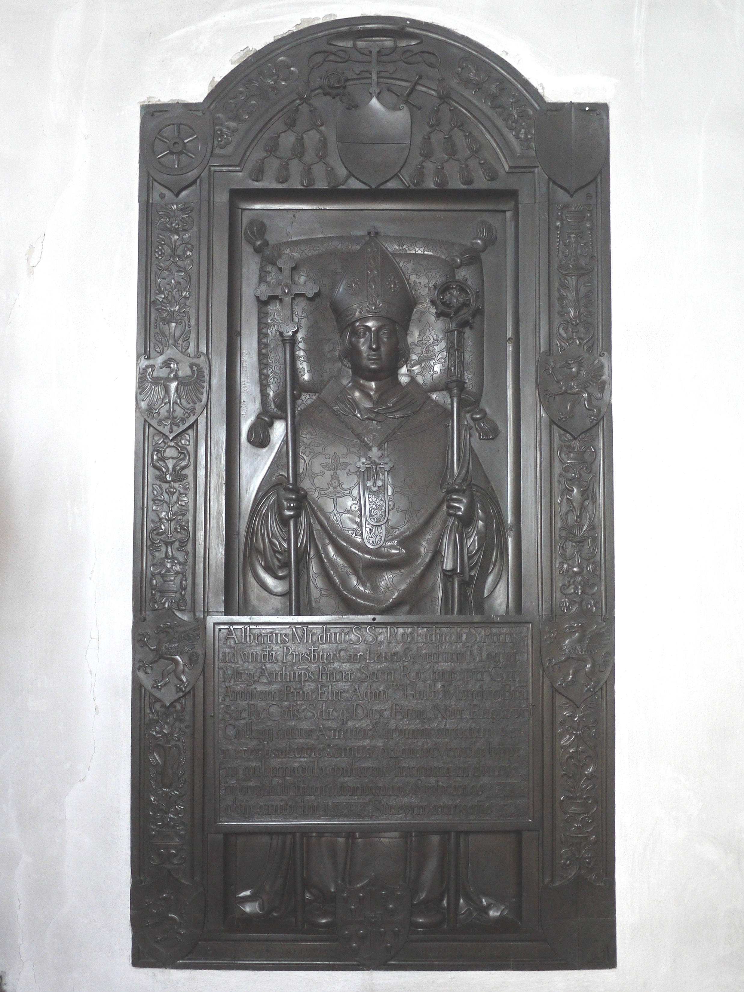 Epitaph Albrecht von Brandenburgs in der Stiftskirche St. Peter und Alexander in Aschaffenburg, erschaffen von Peter Vischer der Jüngere 1525